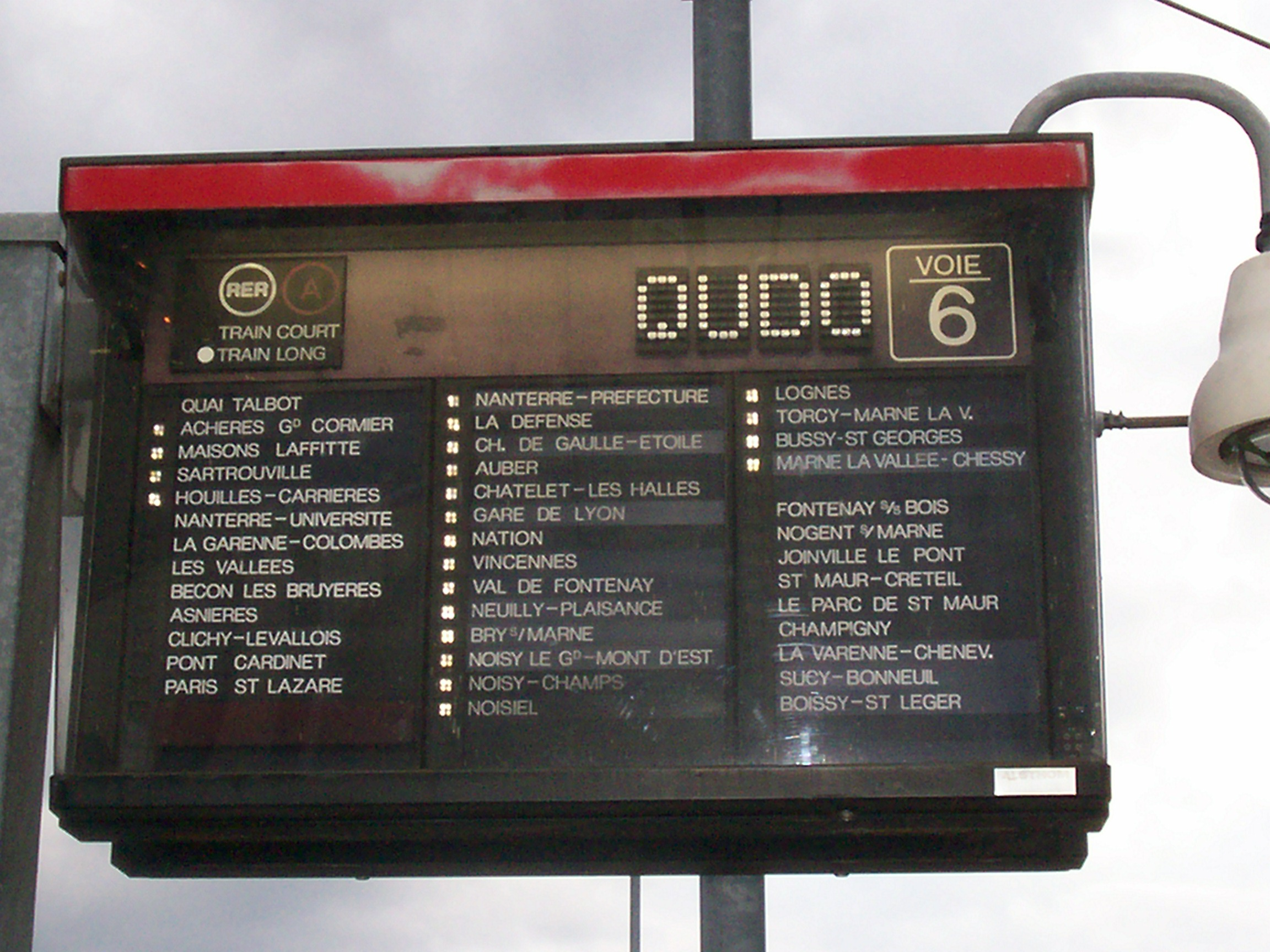 Gare de Poissy